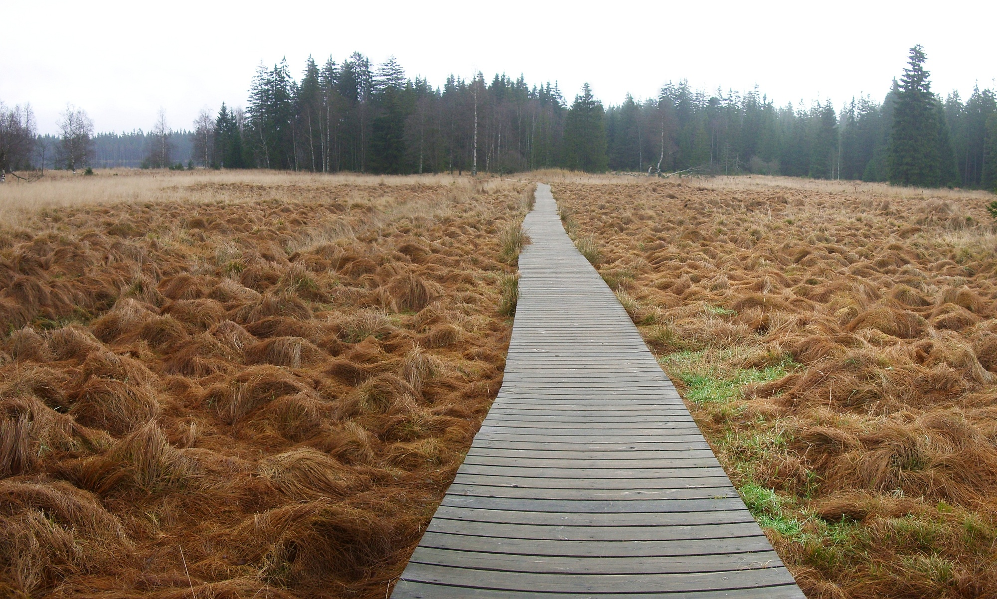 Dřevěný chodník v NPR Kladské rašeliny ve Slavkovském lese.